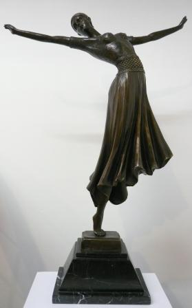 Bronze "La Danseuse" - Demetre CHIPARUS